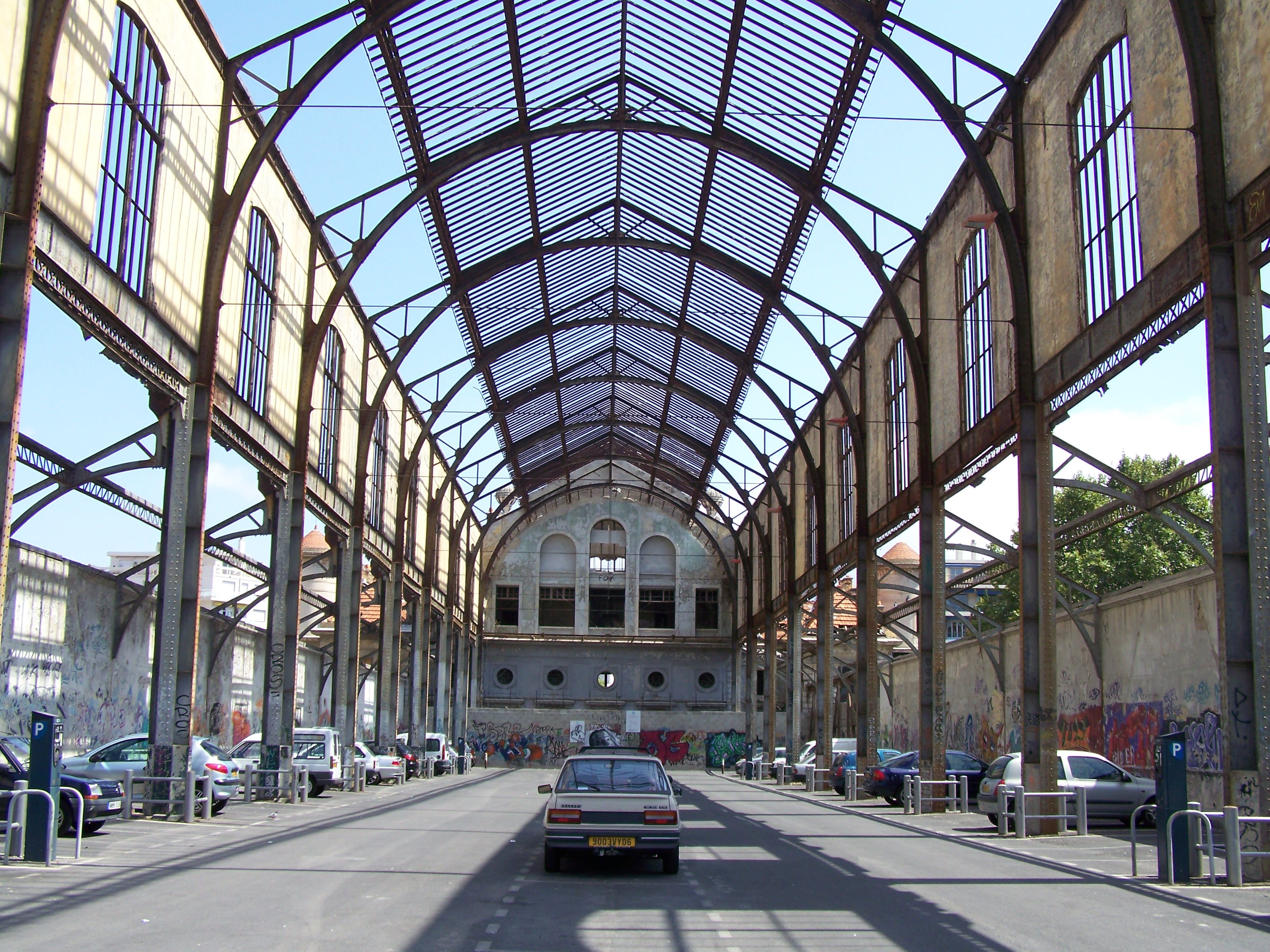 Terminus historique actuellement désaffecté des Chemins de fer de Provence à Nice (Alpes-Maritimes, France). Cette structure est classée monument historique car elle abritait le pavillon de la Russie à l'exposition universelle de 1889.